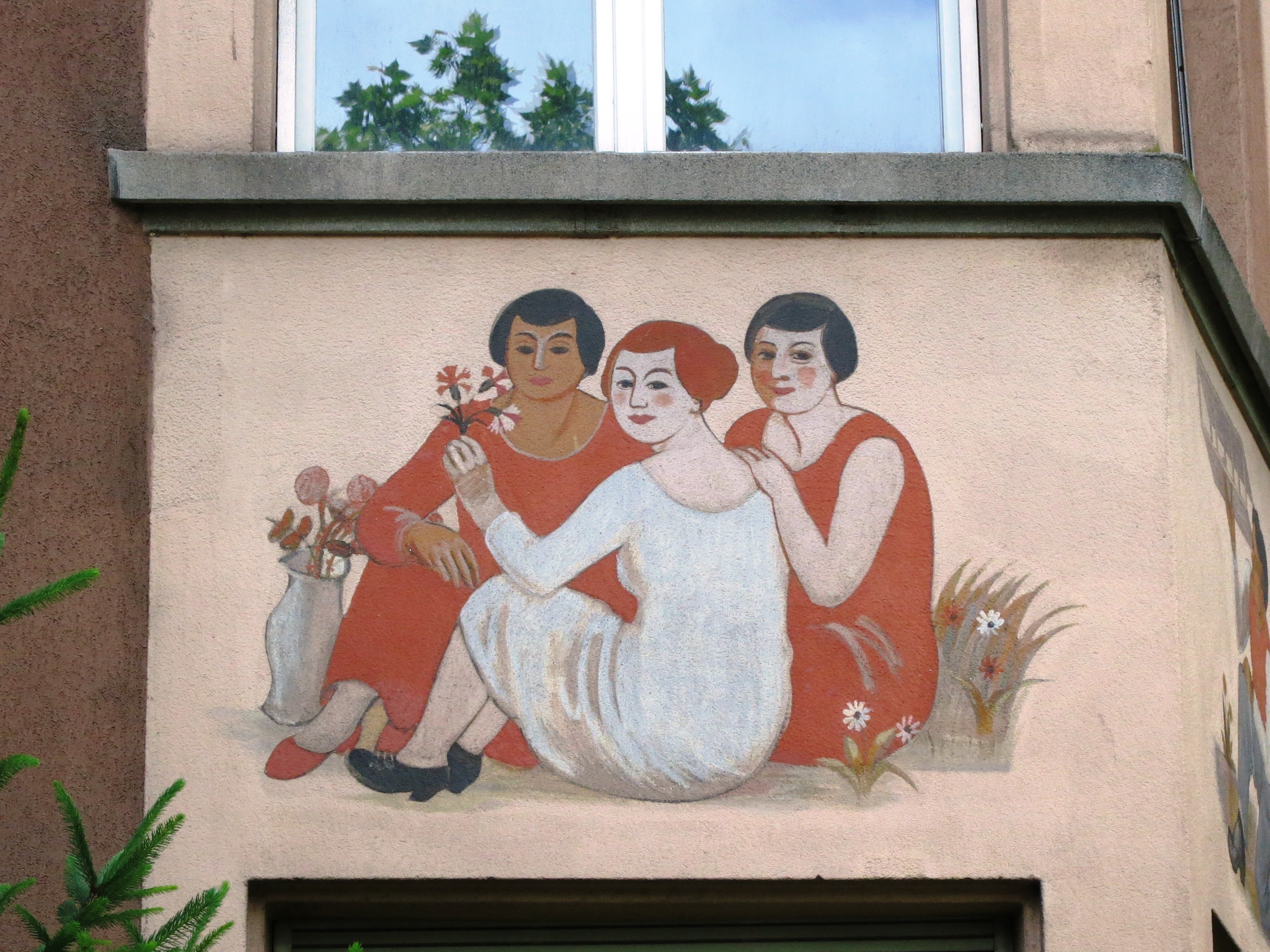 Wohnkolonie Kanzleistrasse 1930, Zürich-Hard, Schweiz